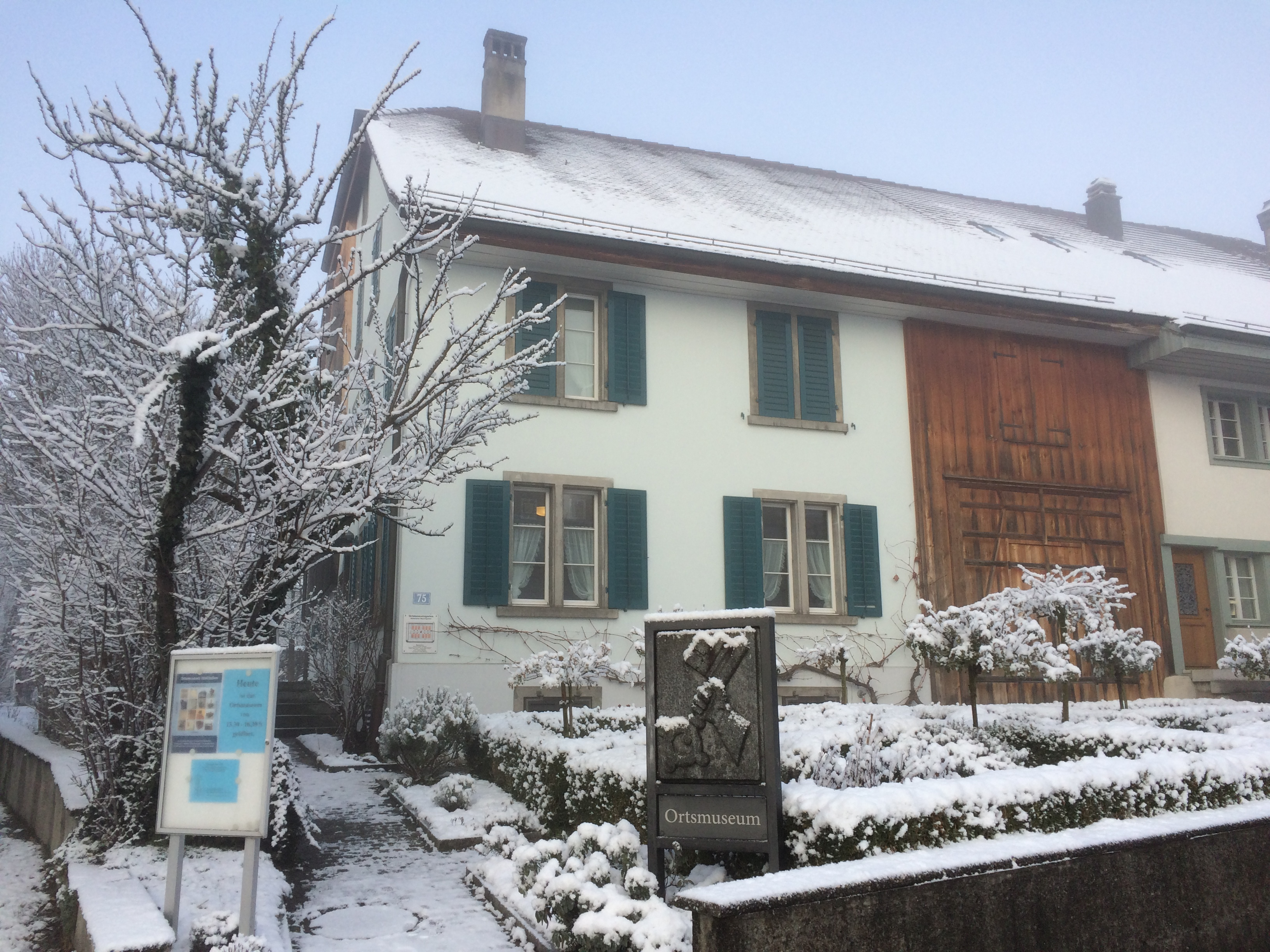 Ortsgeschichtliche Sammlung und Ausstellung in einem Bauernhaus aus dem 16. Jahrhundert (seit 2003).